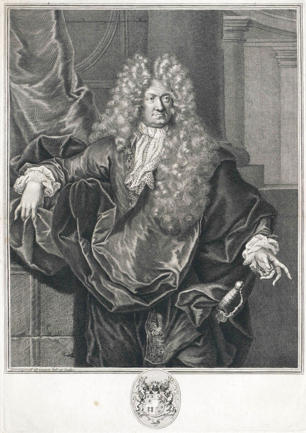 Nach dem der hier abgebildete Franz Ernst von Platen von der Familie Alten das Rittergut des (heutigen) Von-Alten-Gartens in Linden vor Hannover gepachtet hatte, konnte von Platen in den Reichsgrafen-Stand erhoben werden, wurde Premiermister unter dem Herzog Ernst August und von seinem Nachfolger, dem Kurfürsten von Hannover und späteren König von Großbritannien, Georg Ludwig mit der Grafschaft Hallermund belehnt. Hier sehen wir Franz Ernst von Platen mit Perrücke auf einem Kupferstich von Martin Bernigeroth in der barocken Pose eines absolutistischen Herrschers ...